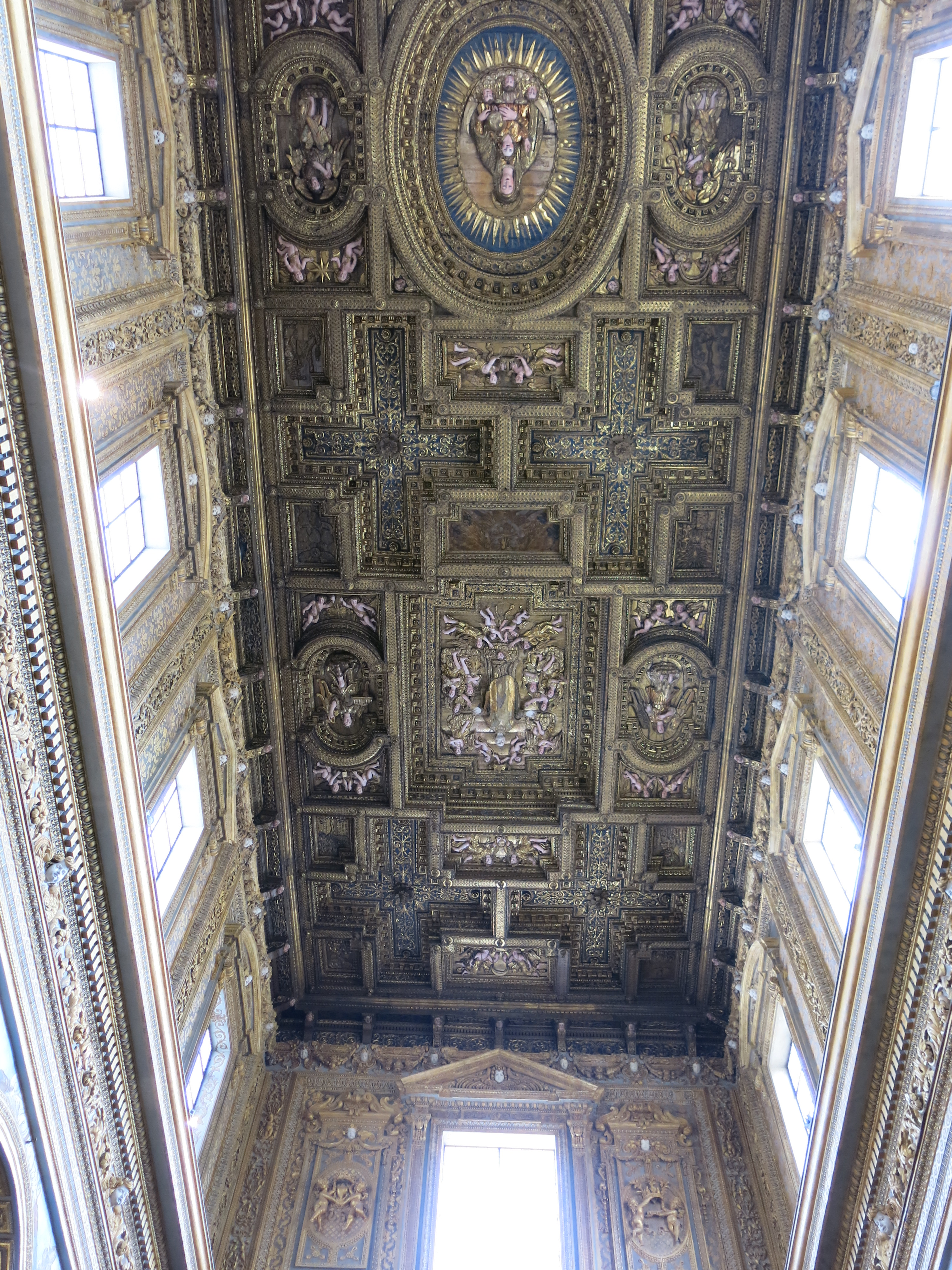 Le chiese di Napoli